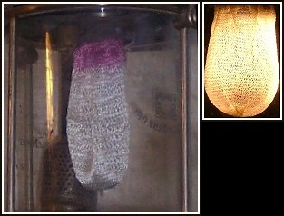 Bildmontage aus zwei Wikipedia-Bildern, die der GNU Freien Dokumentationslizenz unterliegen. Rechtes Bild ist von mir, ebenso die Bearbeitung des linken, das auf dem Original Bild:Gühstrumpf_in_einer_Petromax.jpg basiert, das von Benutzer:Stahlkocher ebenfalls unter GNU Lizenz freigestellt wurde. Anton 21:05, 15. Mär 2005 (CET)